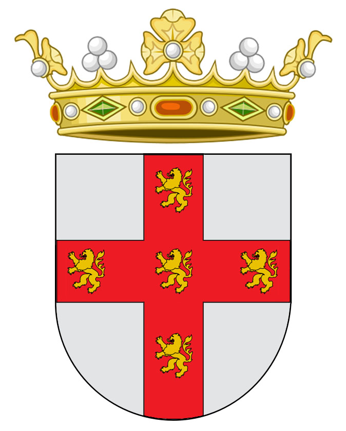 Escudo de armas del Marquesado de Góngora